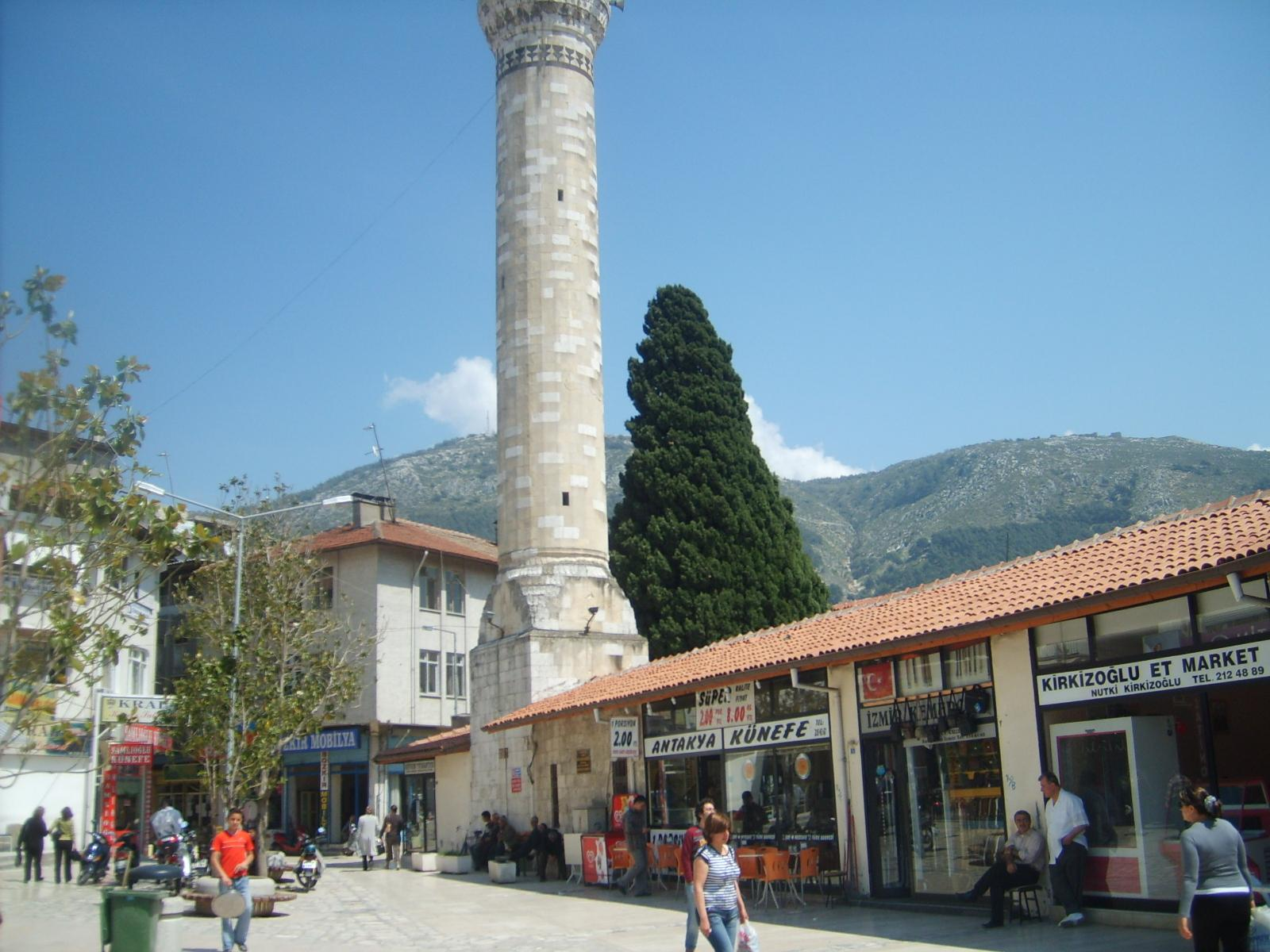 Kullanıcı tarafından çekilmiştir.